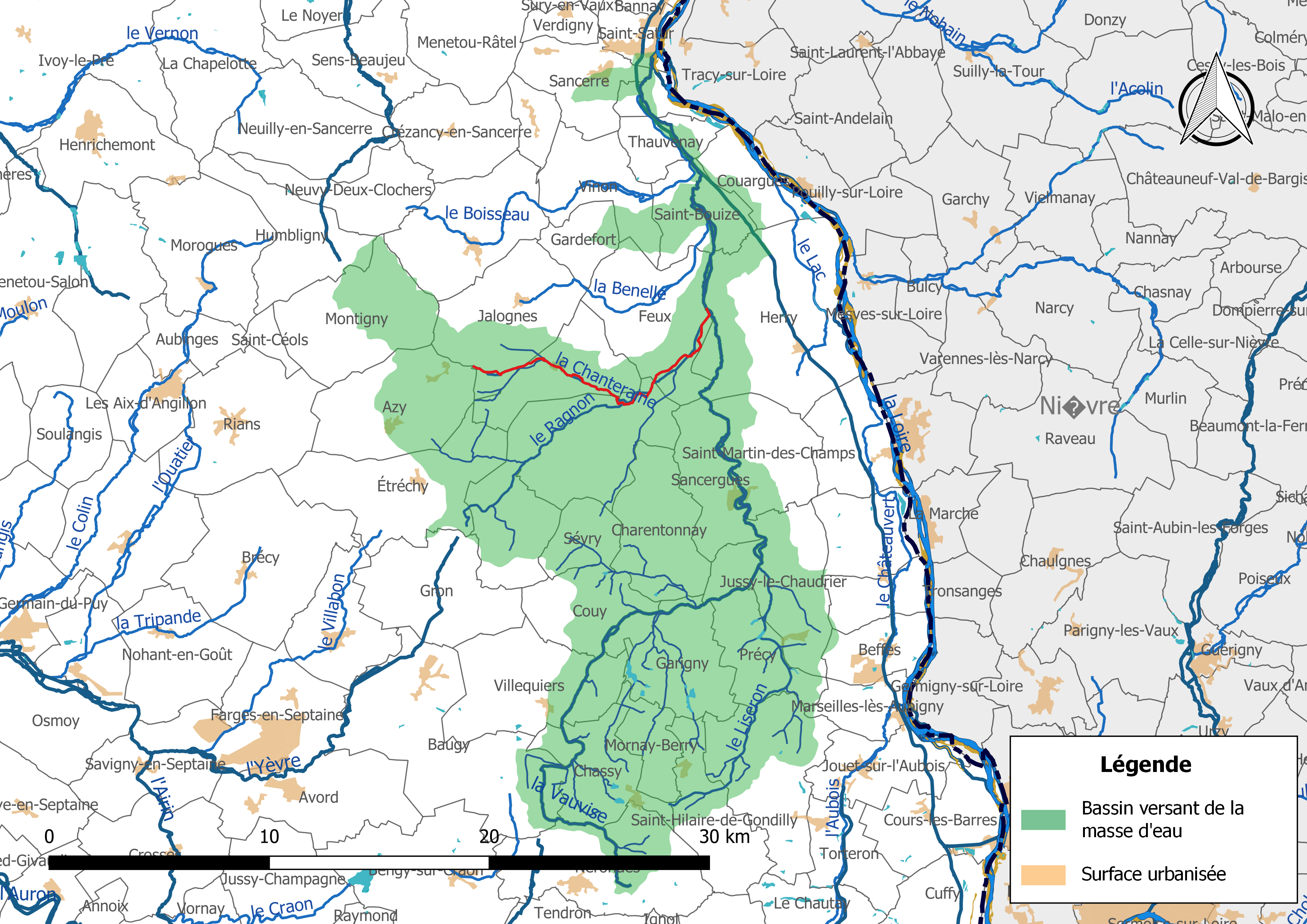 Carte de la masse d'eau « FRGR0290 », avec mise en exergue du cours d'eau « la Chanteraine » (en rouge).